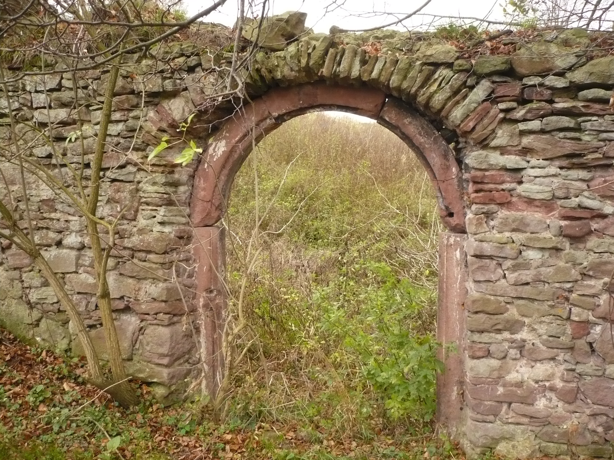 Ruina przy Dworze Dolnym